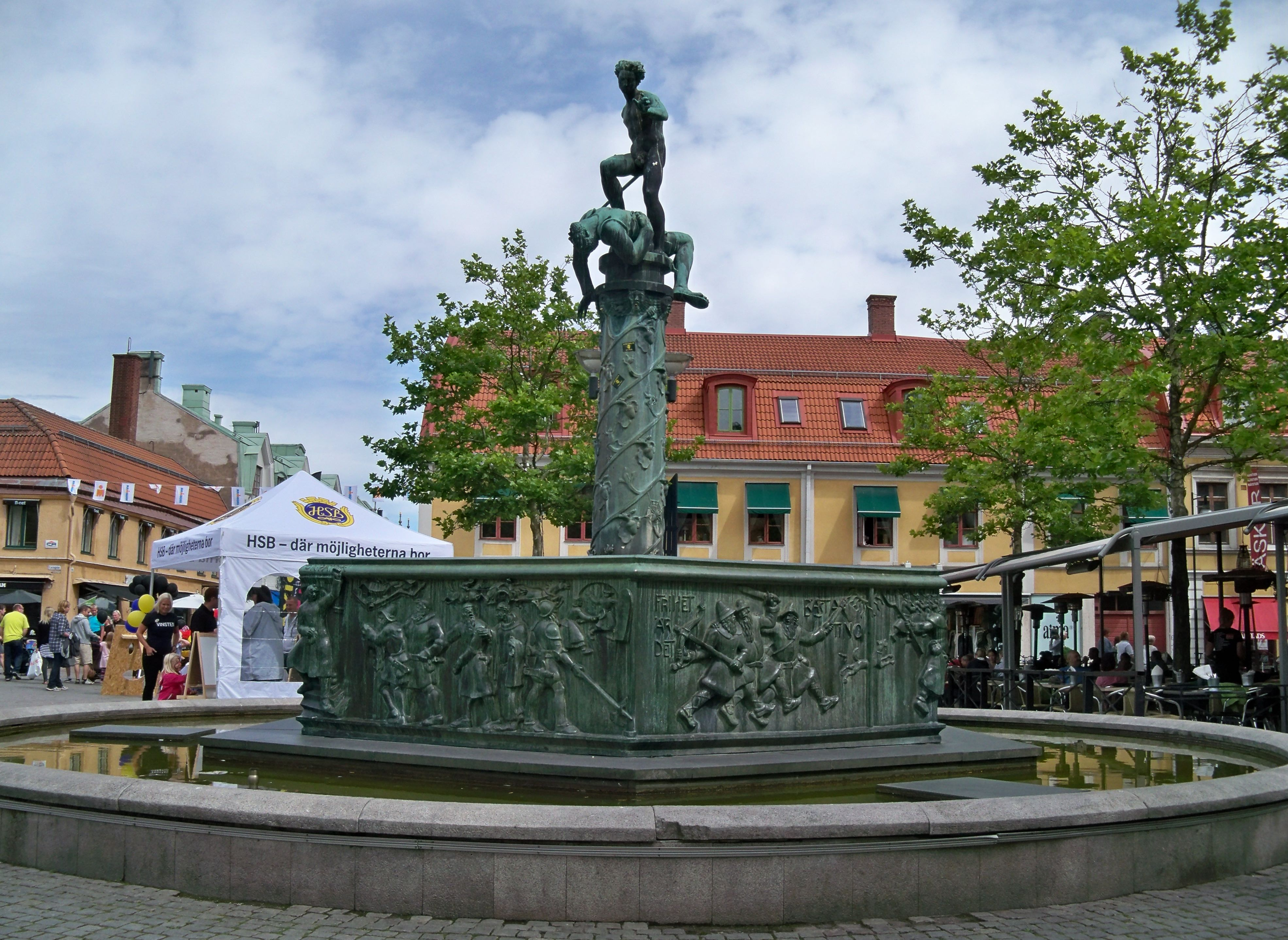 Fontanna z figurą Dawida triumfującego nad Goliatem i płaskorzeźbami upamiętniającymi pierwsze przybycie Gustawa I Wazy do Kalmaru. Plac Larmtorget, Kalmar.